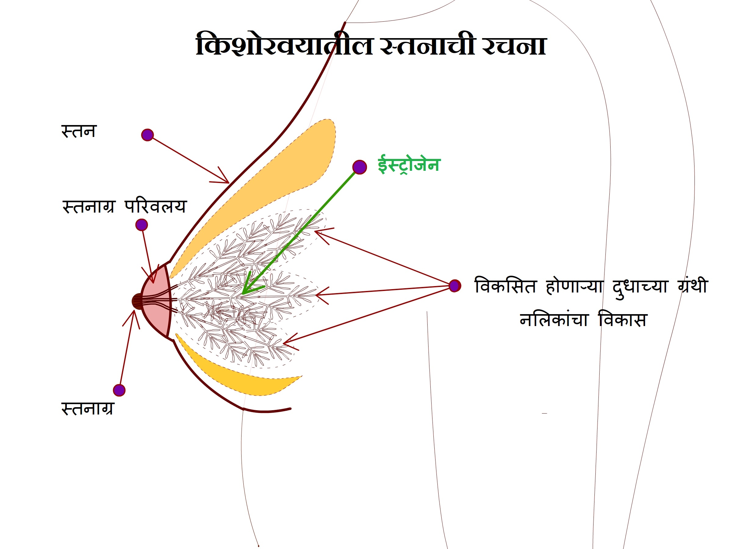 किशोरवयातील स्तनातील दुग्धग्रंथींतील नलिकांचा विकास व रचना दाखवणारी योजनाबद्ध आकृती